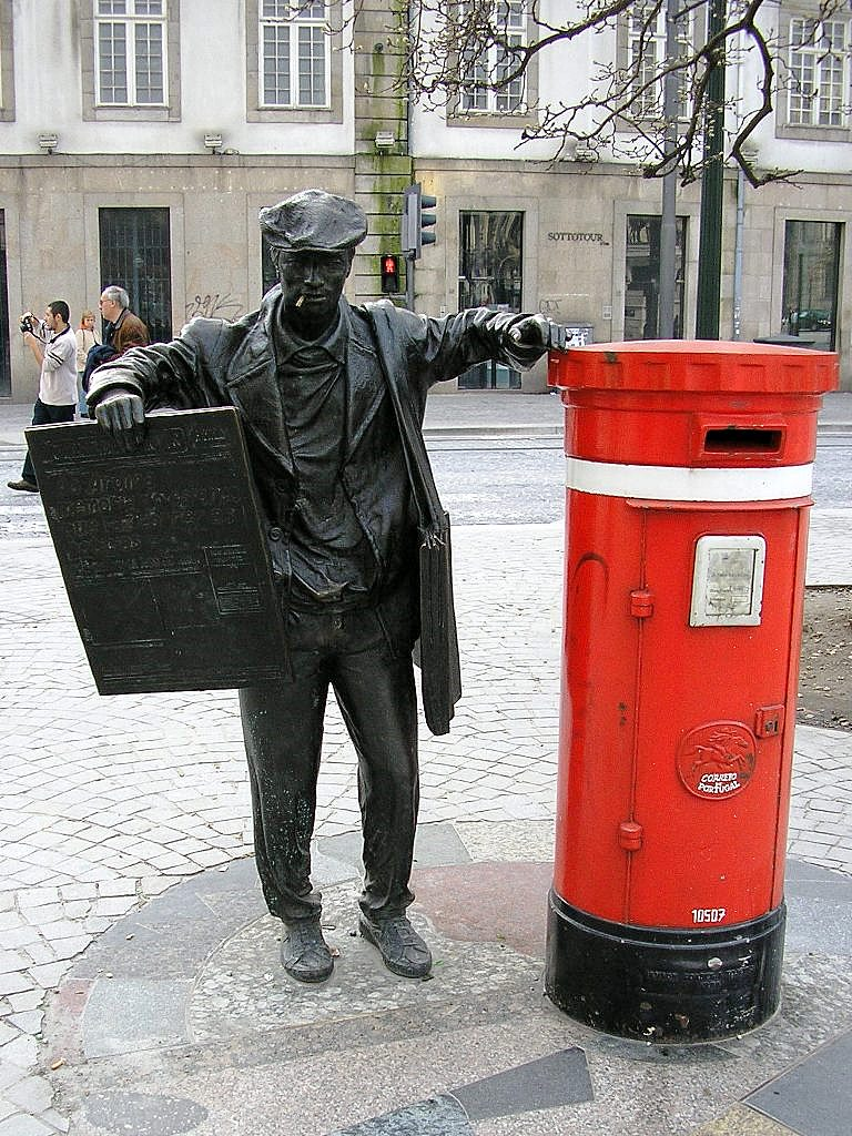 "Ardina" (newspaper seller) statue in Porto, Portugal.